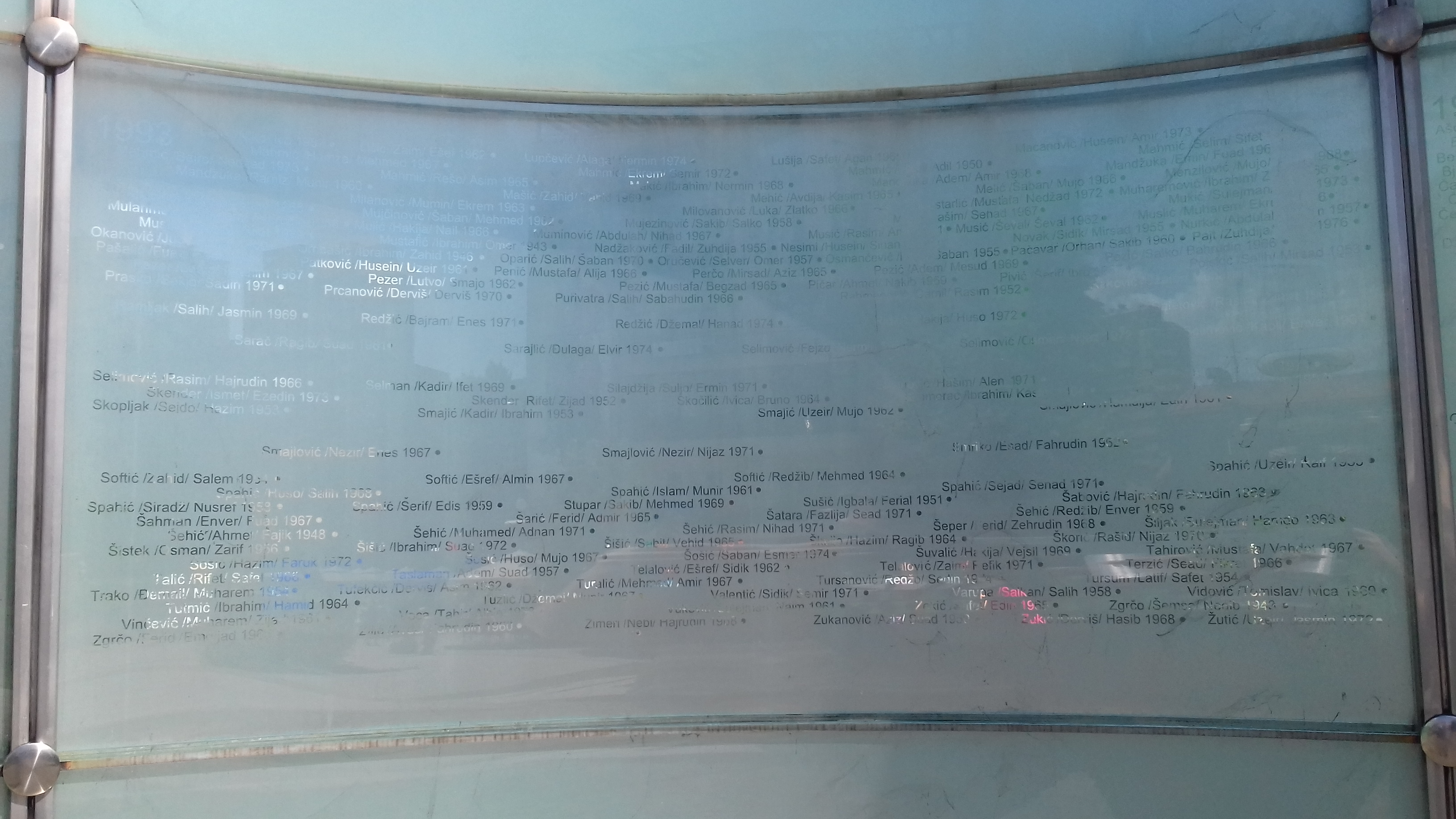 Натписи (имена) убијених особа на подручју Зе-до кантона исписана на Каменом спавачу [сам споменик НИЈЕ сликан (из даљине, као скулптура) јер у БиХ нема слободе панораме, FOP; види такође Category:Memorials of the Bosnian War гдје има само предњих дијелова споменика с натписима]